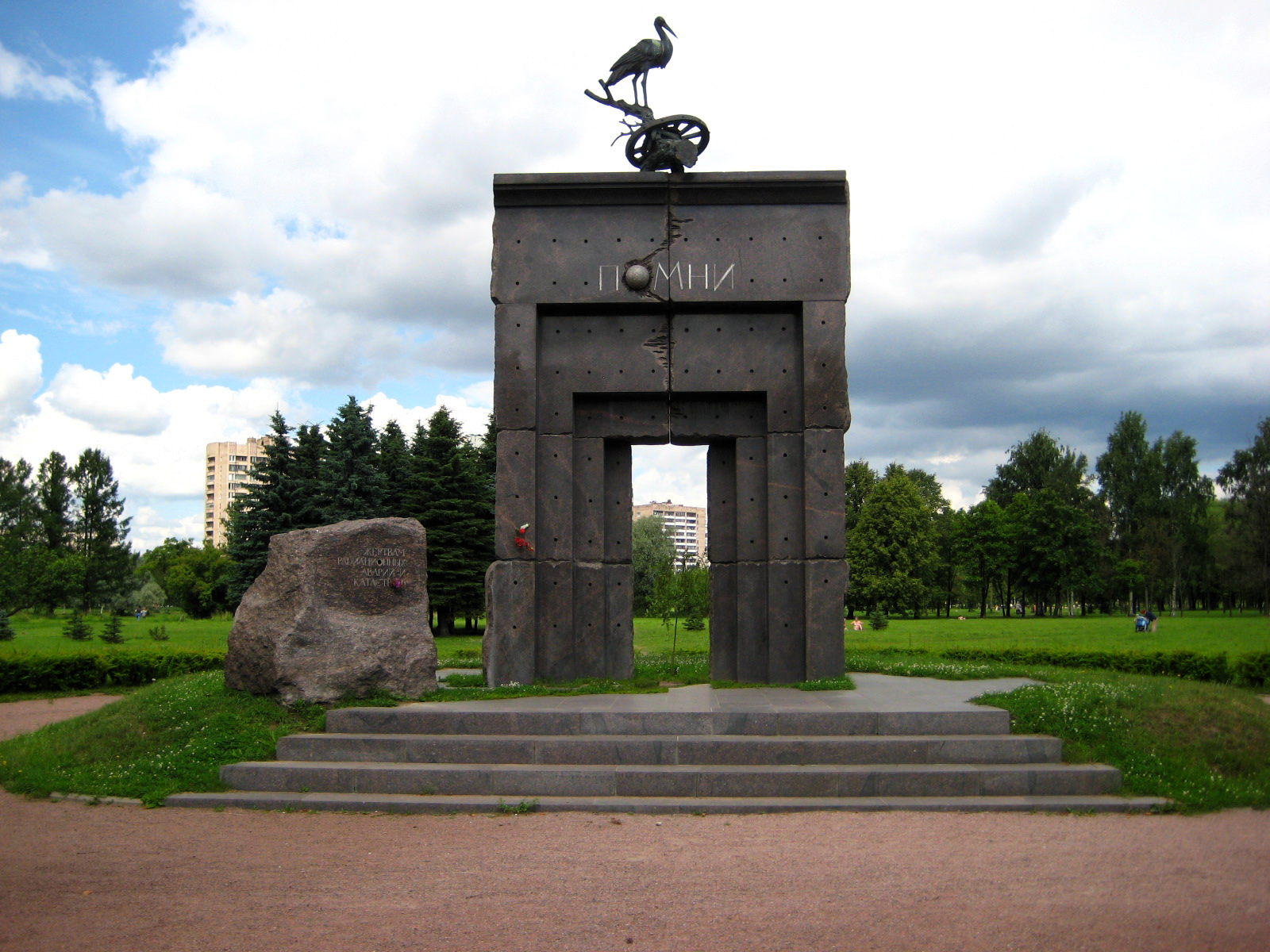 Памятник жертвам катастроф